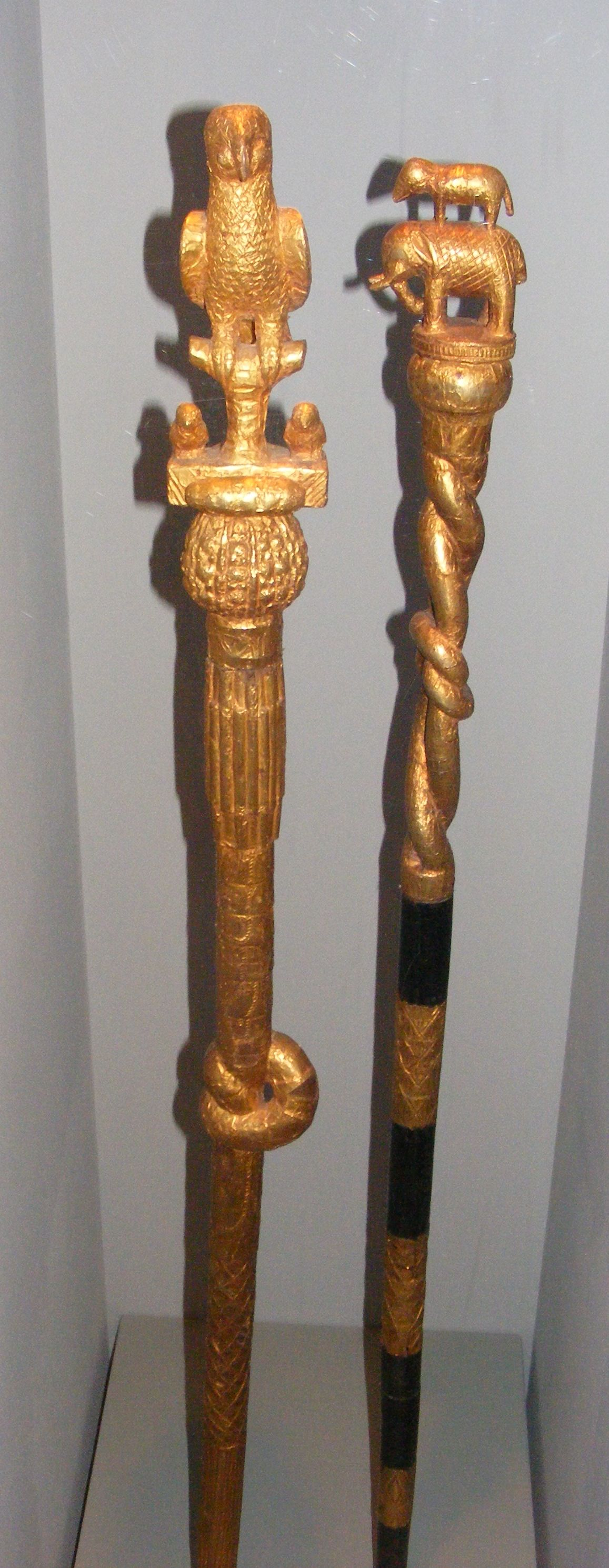 Sprecherstäbe des Ashanti-Reiches mit Tierfiguren für Sprecher hohen gesellschaftlichen Ranges (beispielhaft) - Exponat Nr. 181/182 der Dauerausstellung “Afrika” des Staatlichen Museums für Völkerkunde München (Detail, o.J.)